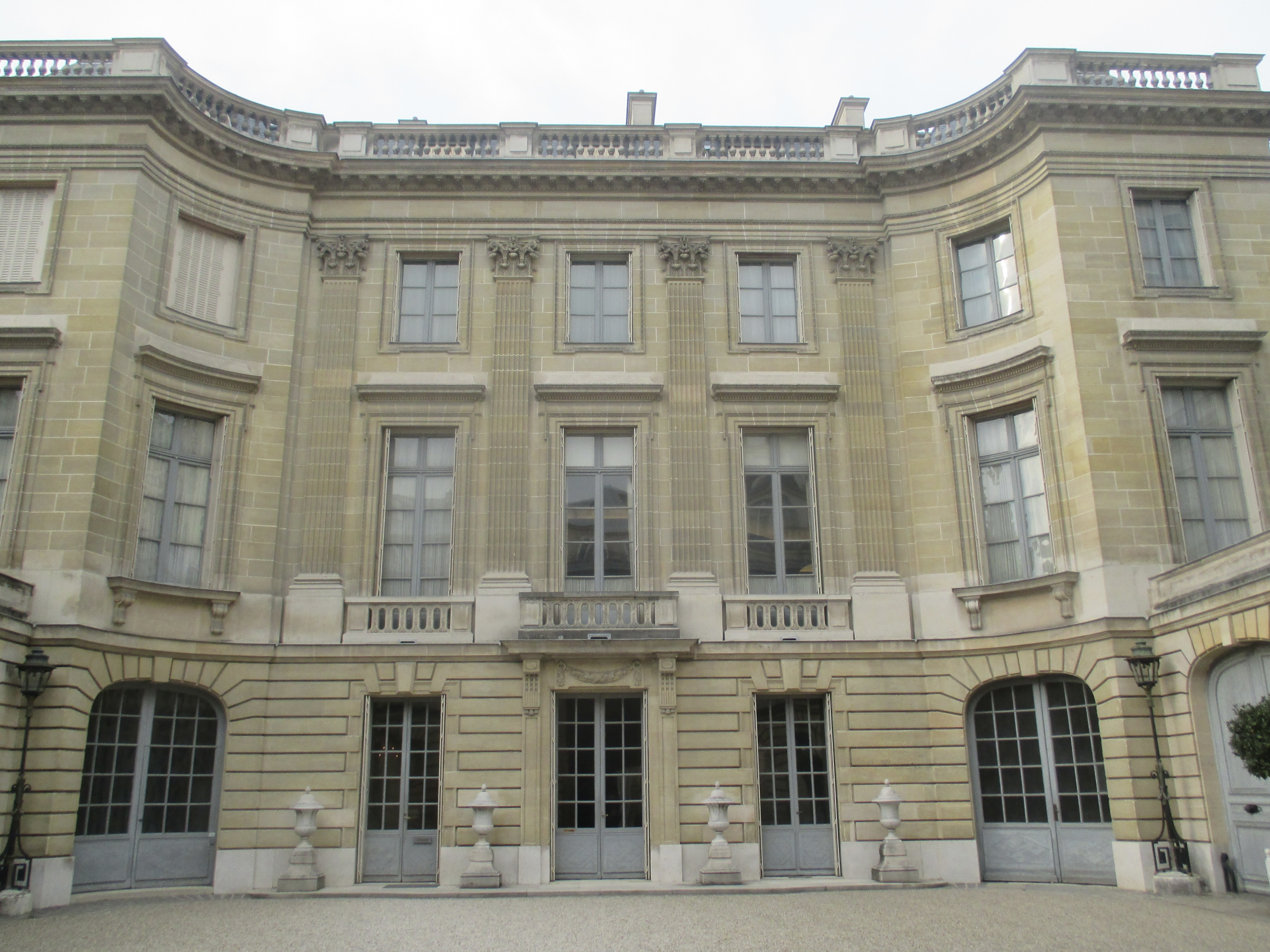 Façade de l'hôtel particulier Camondo donnant dans la cour d'honneur.